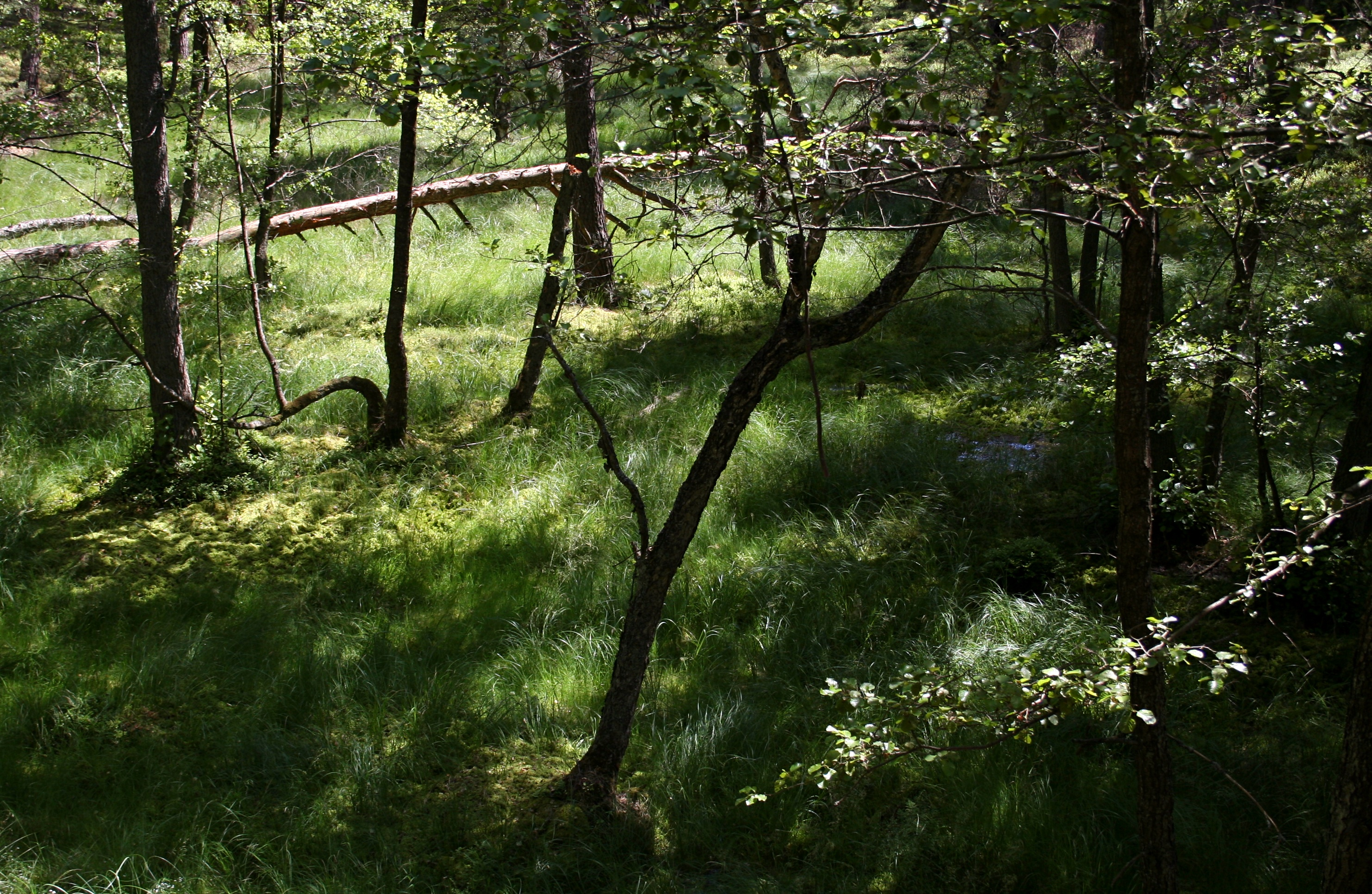 Park Narodowy Bory Tucholskie, torfowisko wysokie